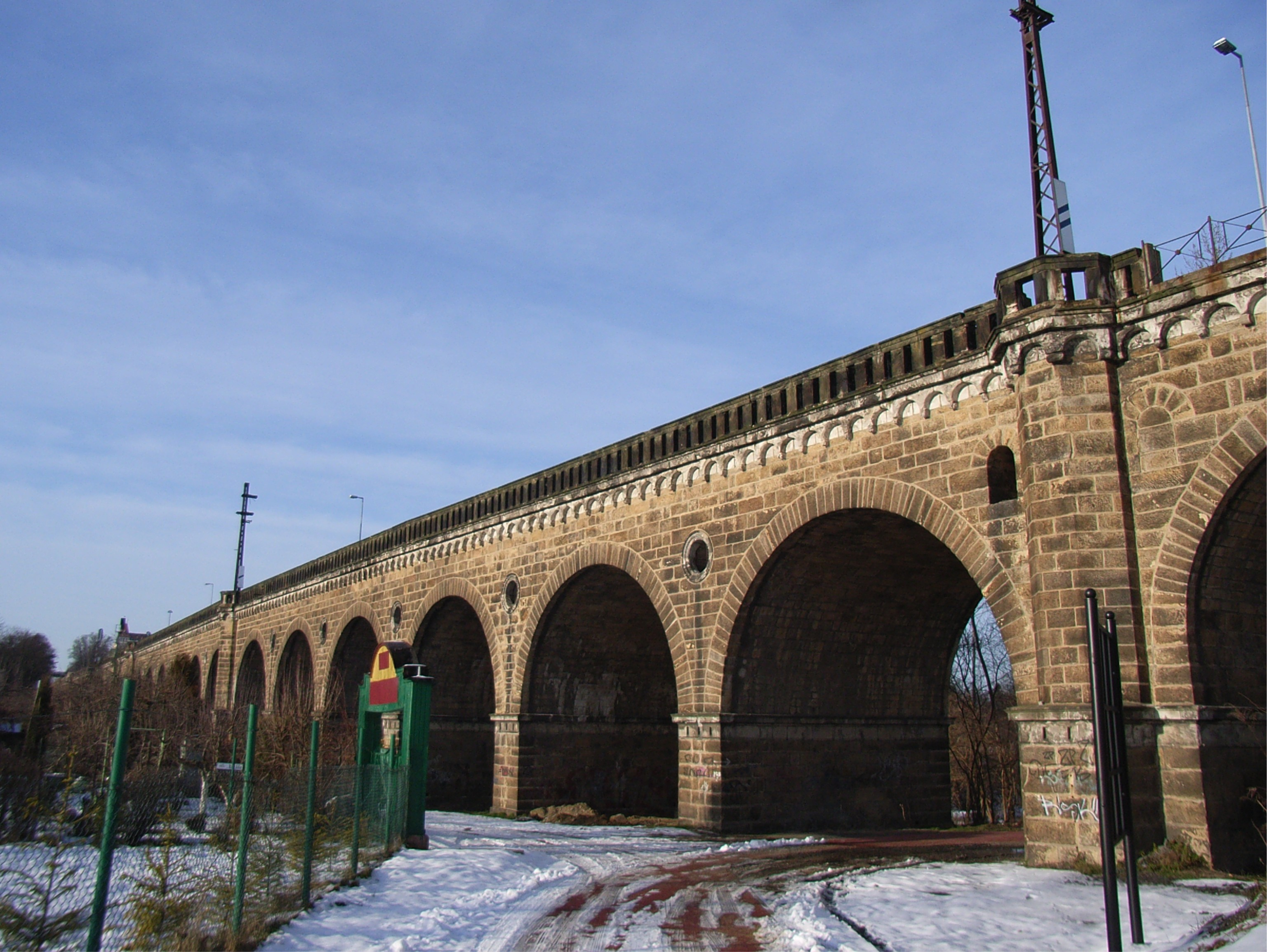 Das Neißeviadukt auf heute polnischer Seite der Neiße (originaler Zustand der Erbauung), Blick Richtung Blockhaus - Görlitz)